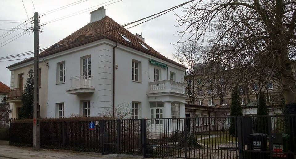 ul. Lipińska 4, Warszawa